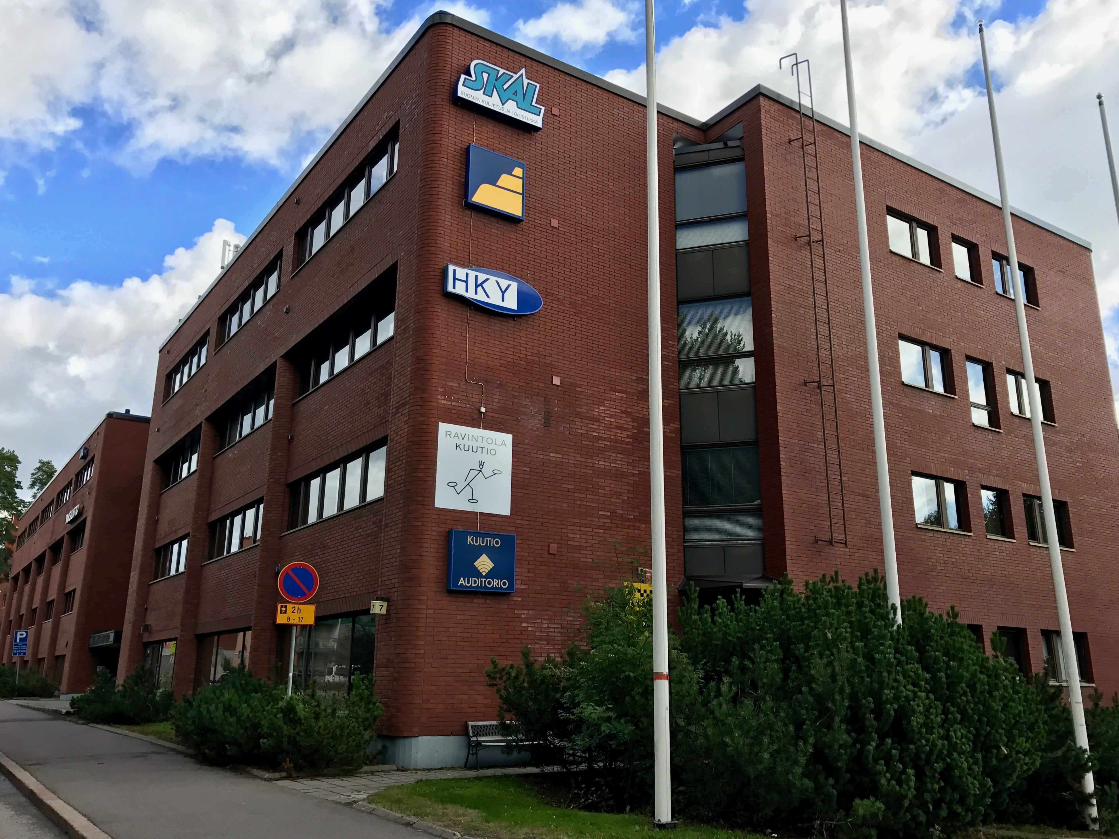 Suomen Kuljetus ja Logistiikka SKAL ry:n päätoimipiste Helsingin Haagassa.